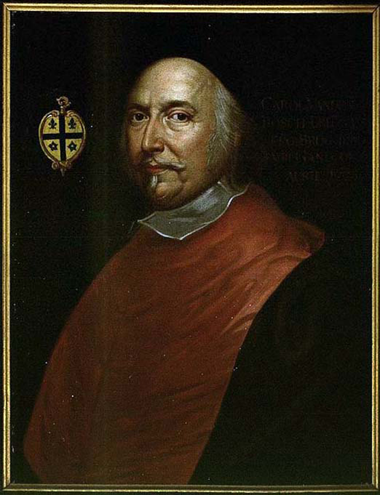 Sint-Baafskathedraal, Gent Portret van Mgr. Vanden Bosch, inv nr: 499/8